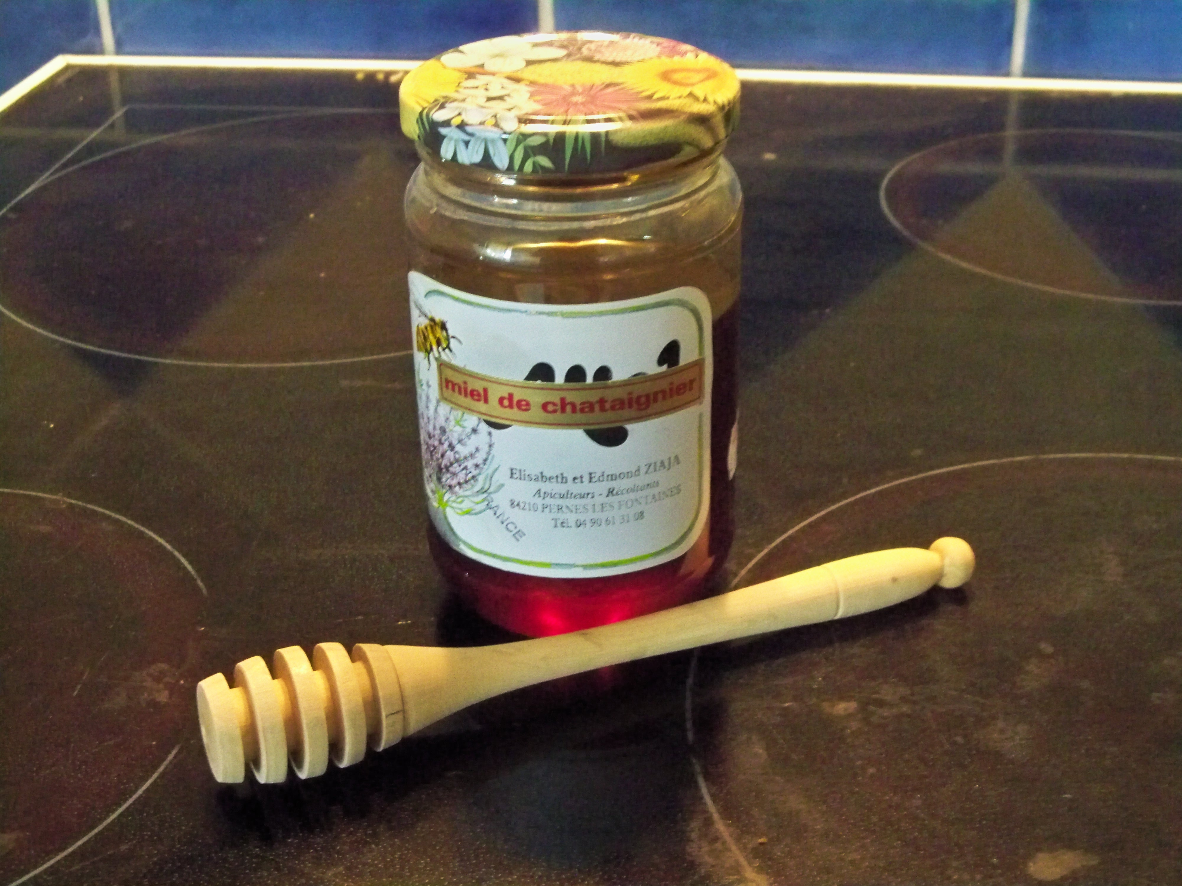 Pot de Miel et sa cuillère